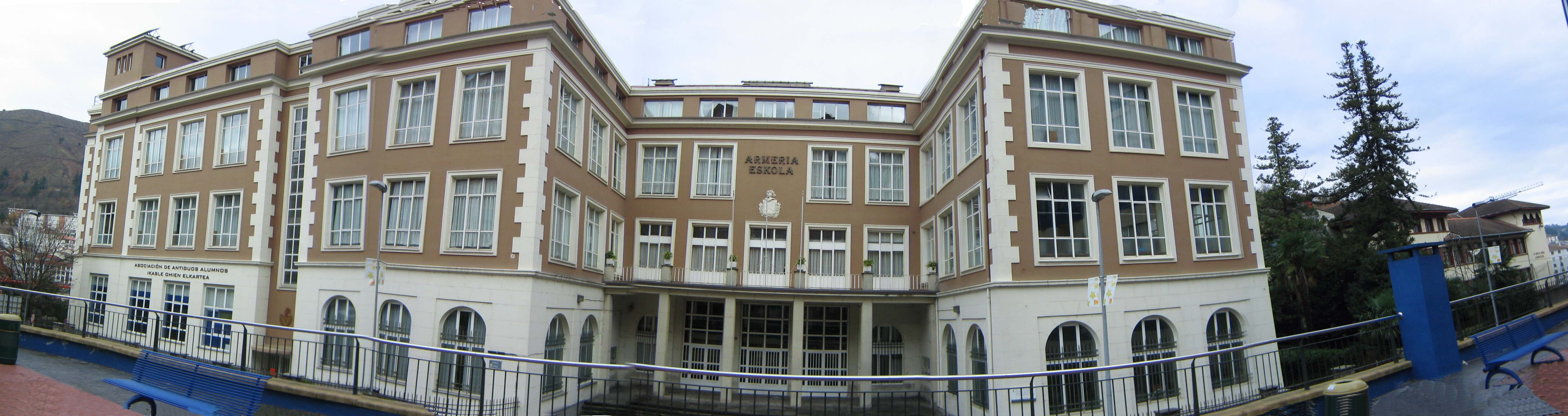 Fachada principal de la Escuela de Armería de Eibar. Diciembre 2005.